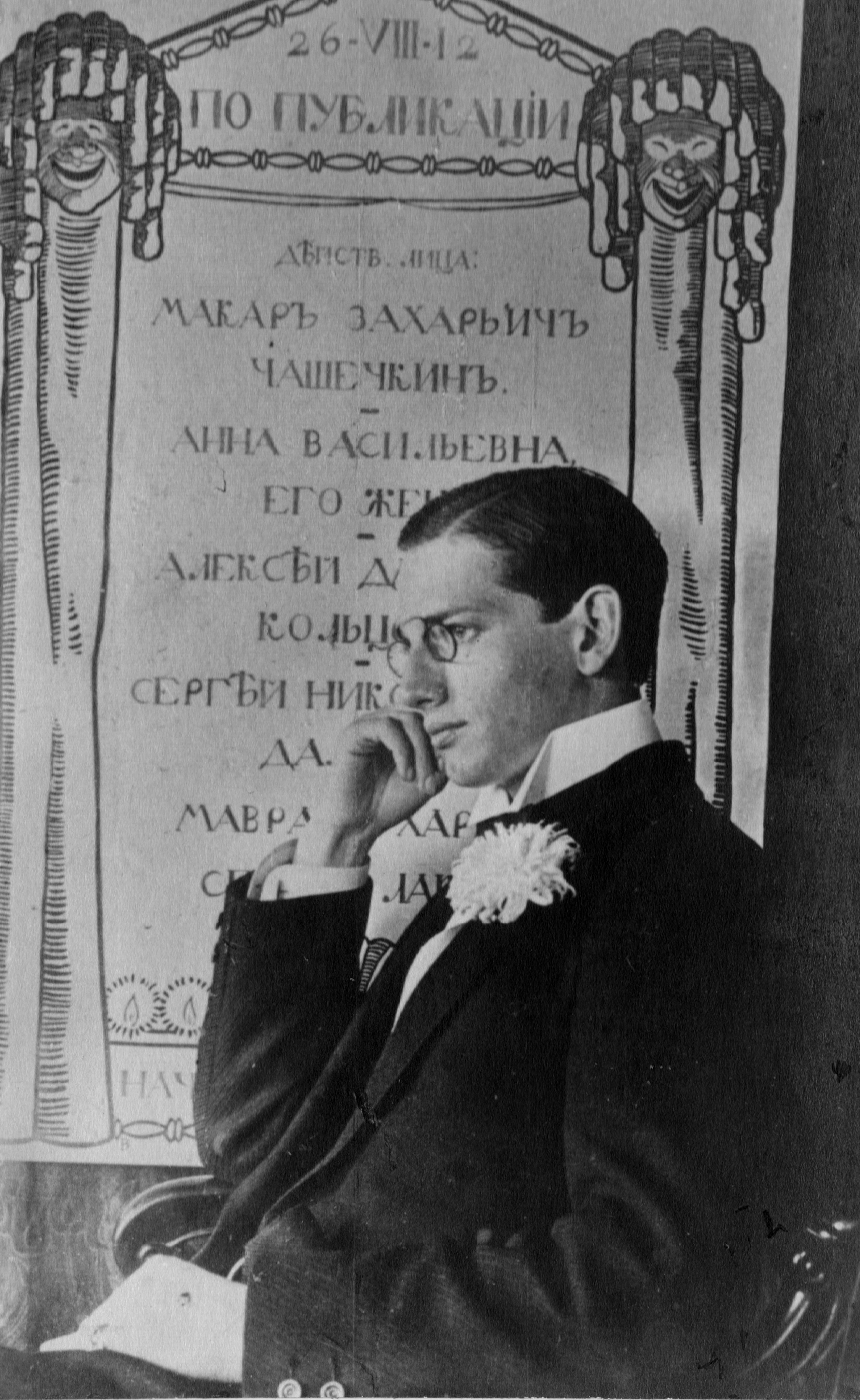 Мюллер Владимир Николаевич, Финляндия, 1912